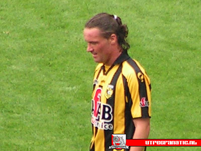 Stijn Vreven